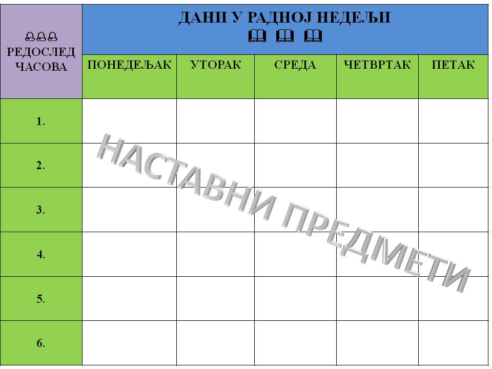 Primer tabelarnog resenja